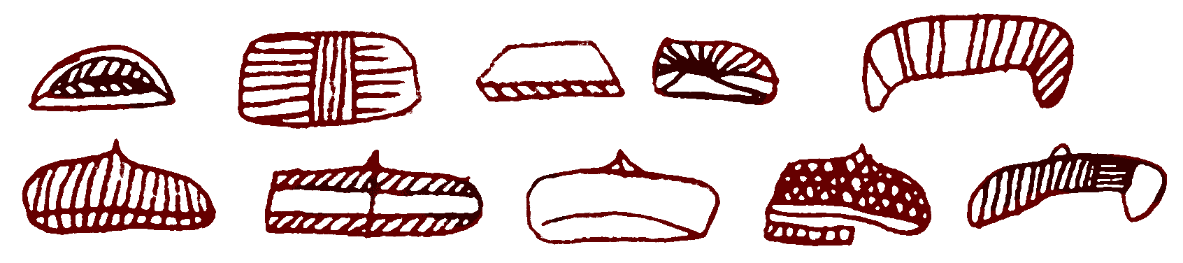 Ideomorfos tipo Tectiforme de la Galería A (primer santuario) de la Cueva de La Pasiega, en el monte Castillo, localidad de Puente Viesgo (Cantabria, España)